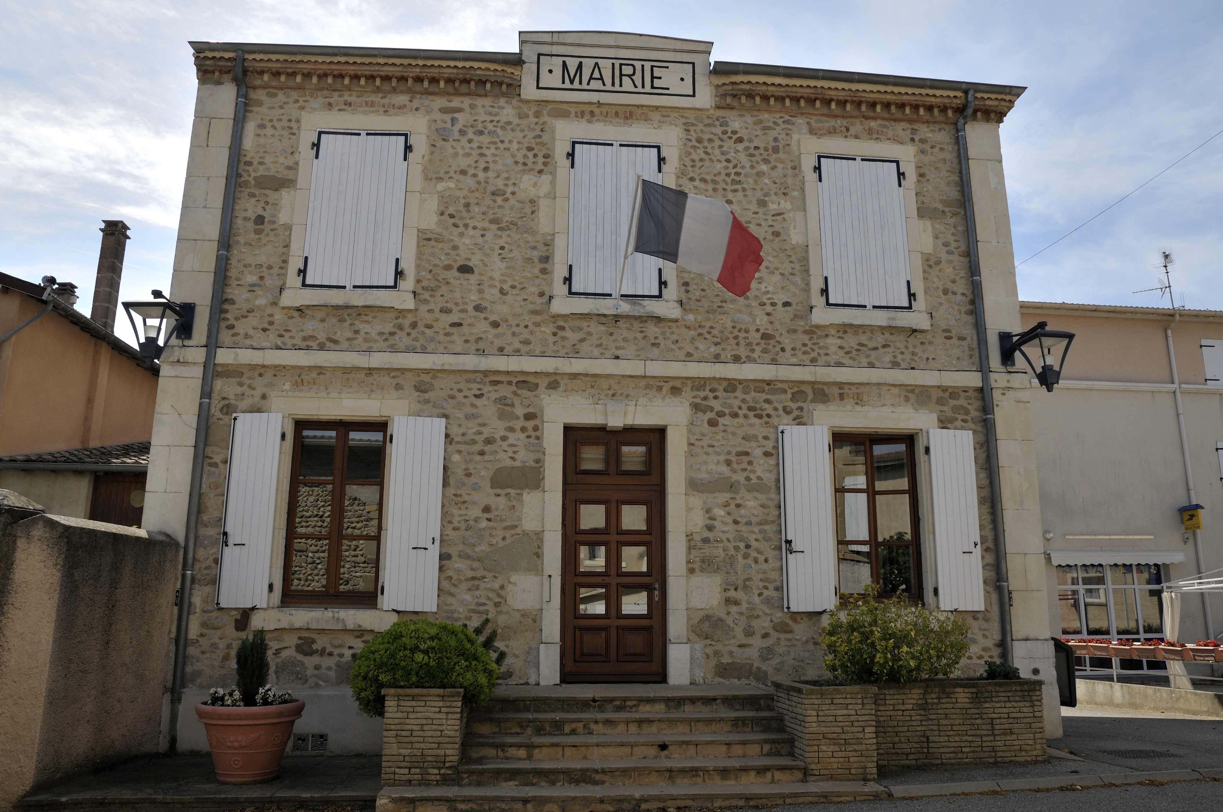 la mairie